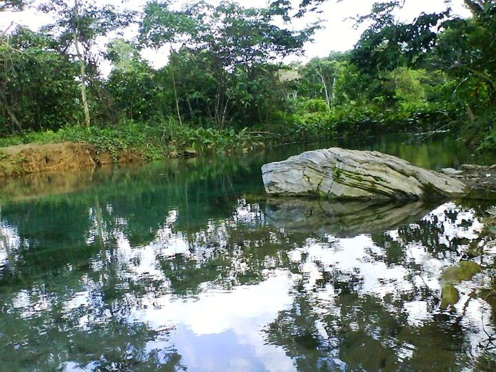 Agua cristalina del afluente denominado "La piedra" que emana cerca de la población de Guigovelaga.